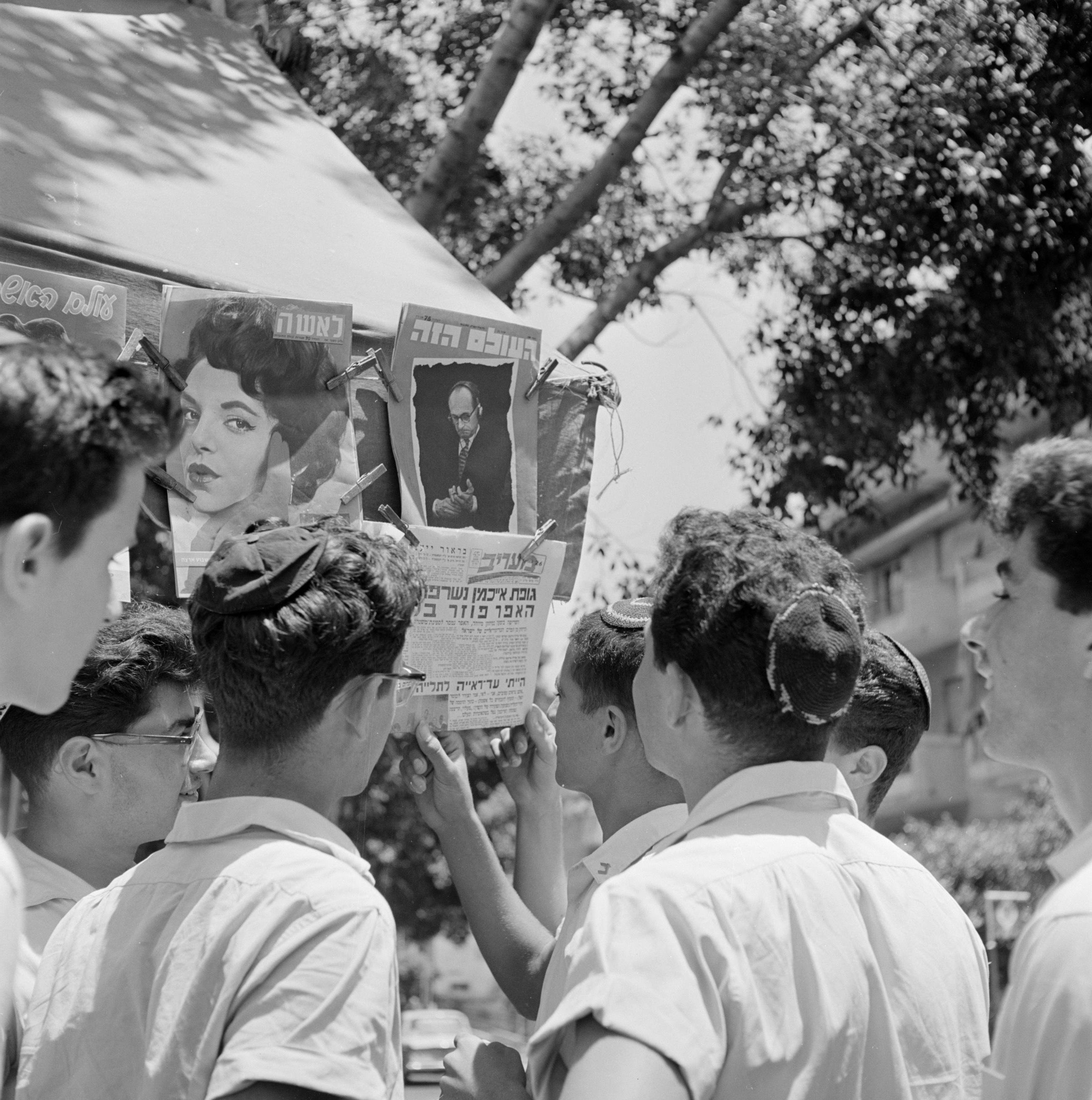 Collectie / Archief : Fotocollectie Van de Poll Reportage / Serie : Israël 1964-1965: Tel Aviv, Karl Adolf Eichmann Beschrijving : Joodse jongemannen met keppeltjes staan voor een kiosk en houden een krant met daarin een artikel over Karl Adolf Eichmann omhoog Annotatie : Karl Adolf Eichmann (1906-1962) was een Duitse SS-functionaris in het Derde Rijk en één van de hoofdverantwoordelijken voor de massamoord op de Joden Datum : 1964 Locatie : Israël, Tel Aviv Trefwoorden : affiches, jongens, joodse religie, kiosken, kranten, mannen, straatbeelden Persoonsnaam : Eichmann, Adolf Fotograaf : Poll, Willem van de Auteursrechthebbende : Nationaal Archief Materiaalsoort : Negatief (zwart/wit) Nummer archiefinventaris : bekijk toegang 2.24.14.02 Bestanddeelnummer : 255-1848